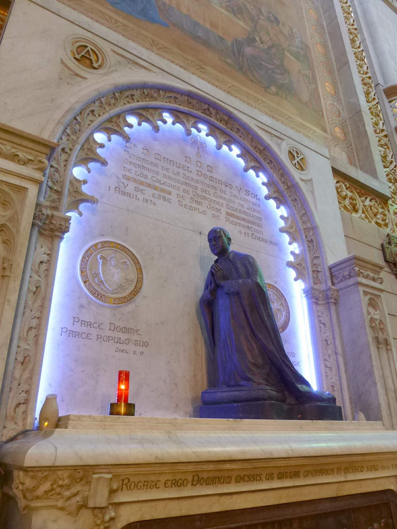 Templo de la Reparación (Tortosa, Tarragona)